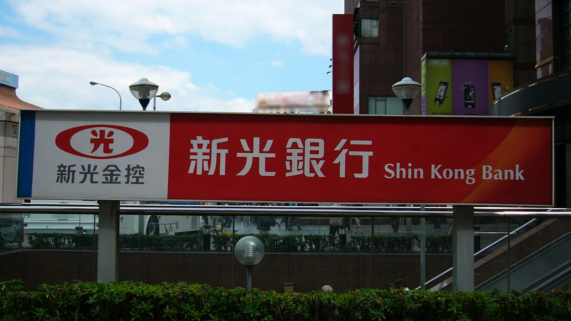 新光人壽保險摩天大樓前廣場設置的臺灣新光商業銀行招牌。